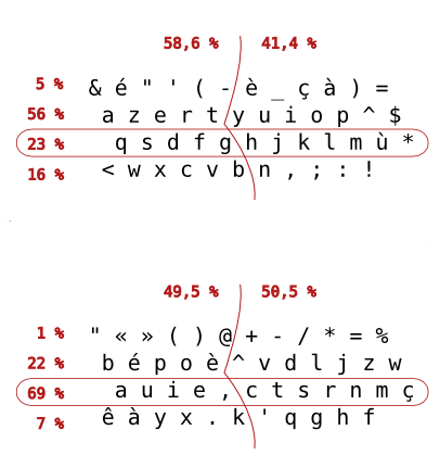 Statistiques d'utilisation des touches en français sur les dispositions AZERTY et BEPO